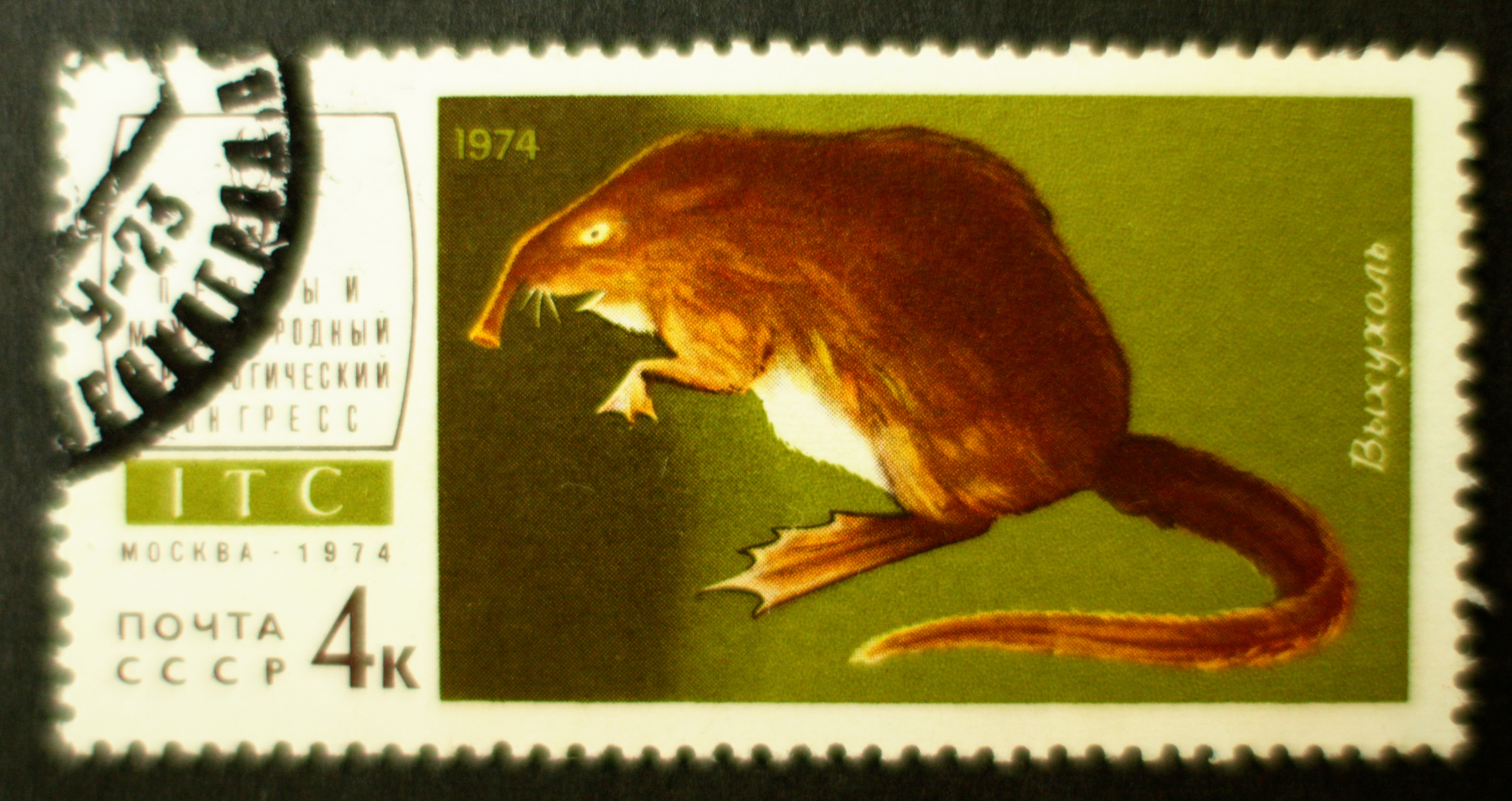 Briefmarke, Sowjetunion